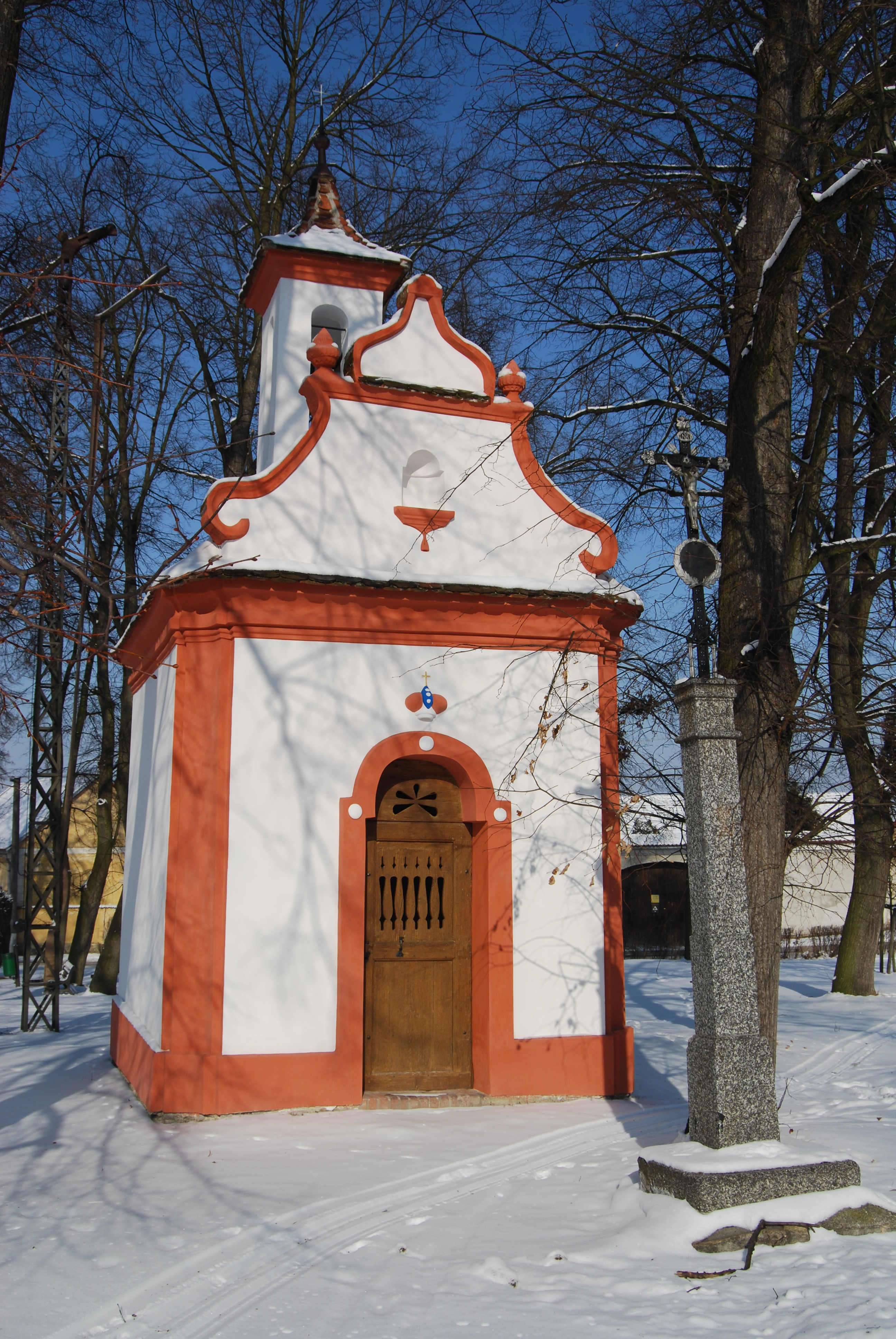 Návesní kaple Navštívení Panny Marie z roku 1822. Ražice. Okres Písek. Česká republika.